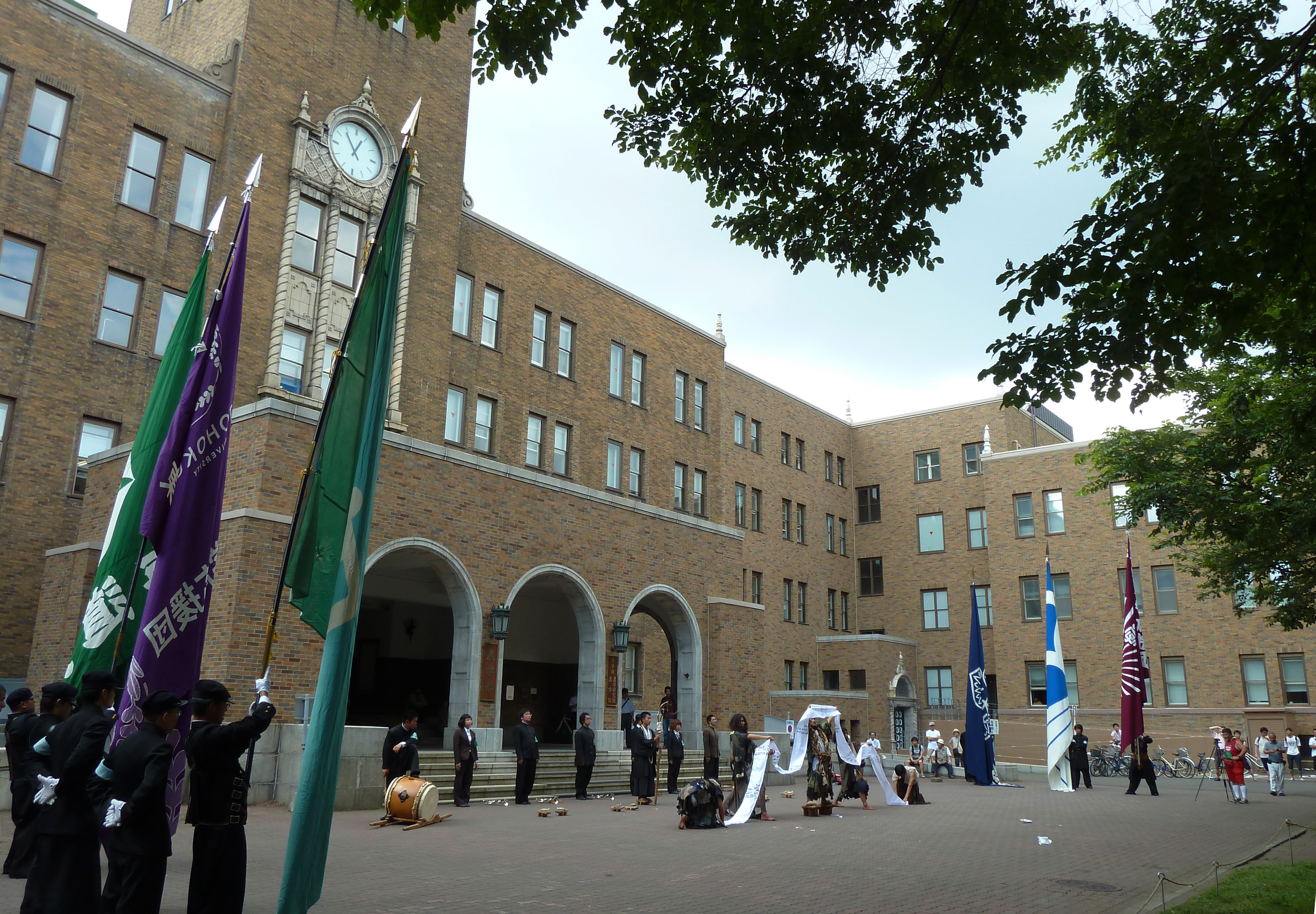 2011年の七大戦の応援パレード